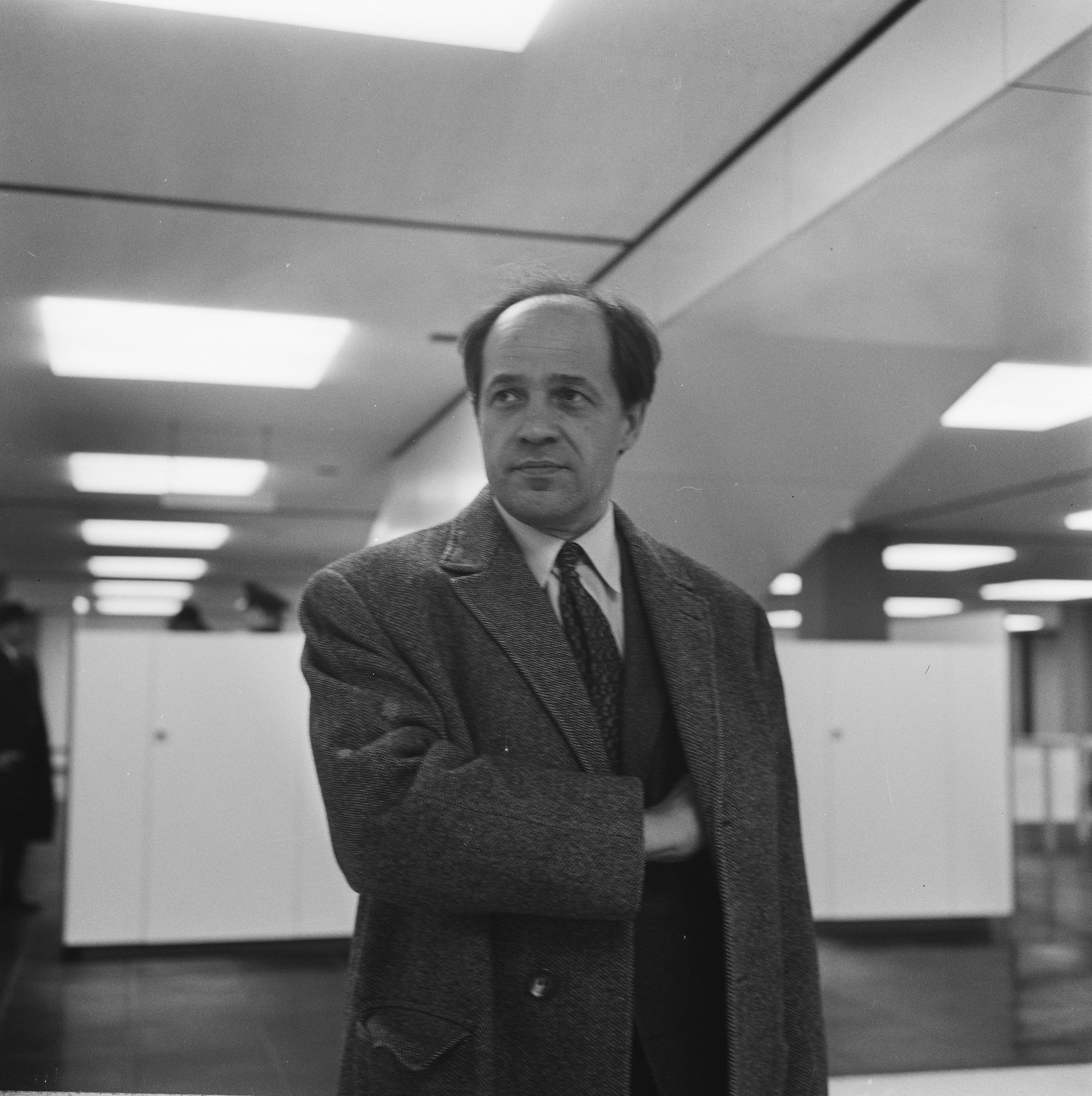 Collectie / Archief : Fotocollectie Anefo Reportage / Serie : [ onbekend ] Beschrijving : Pierre Boulez , Franse dirigent Datum : 28 februari 1968 Trefwoorden : dirigenten Persoonsnaam : Boulez, Pierre Fotograaf : Evers, Joost / Anefo Auteursrechthebbende : Nationaal Archief Materiaalsoort : Negatief (zwart/wit) Nummer archiefinventaris : bekijk toegang 2.24.01.03 Bestanddeelnummer : 921-1210